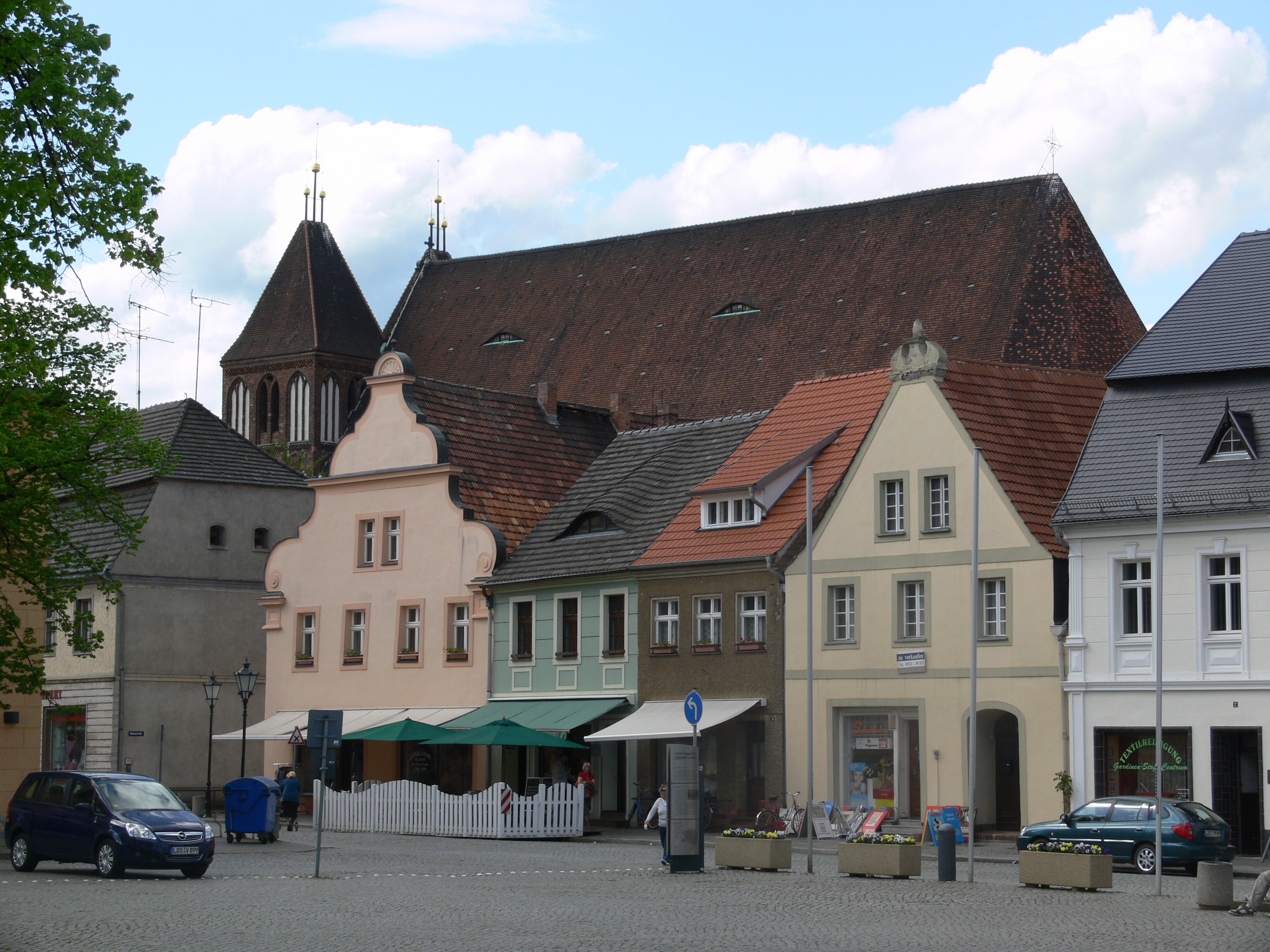 Luckau, Landkreis Dahme-Spreewald, Brandenburg Am Markt, im HIntergrund die St.-Nikolai-Kirche